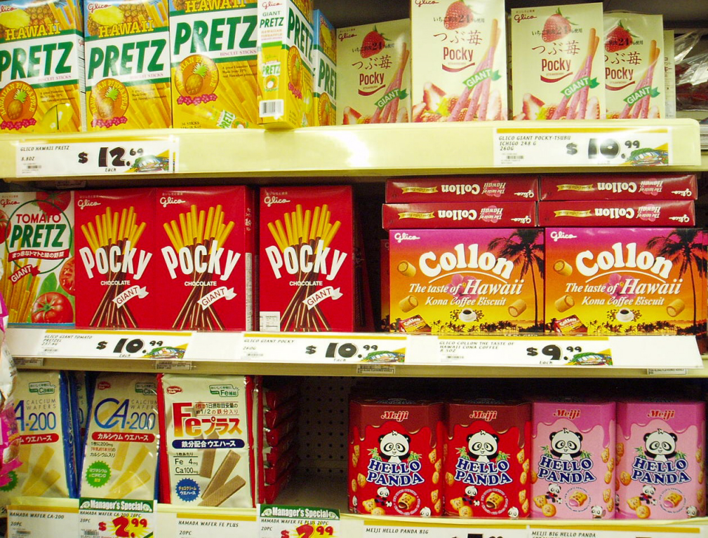 For my Pocky-loving friends